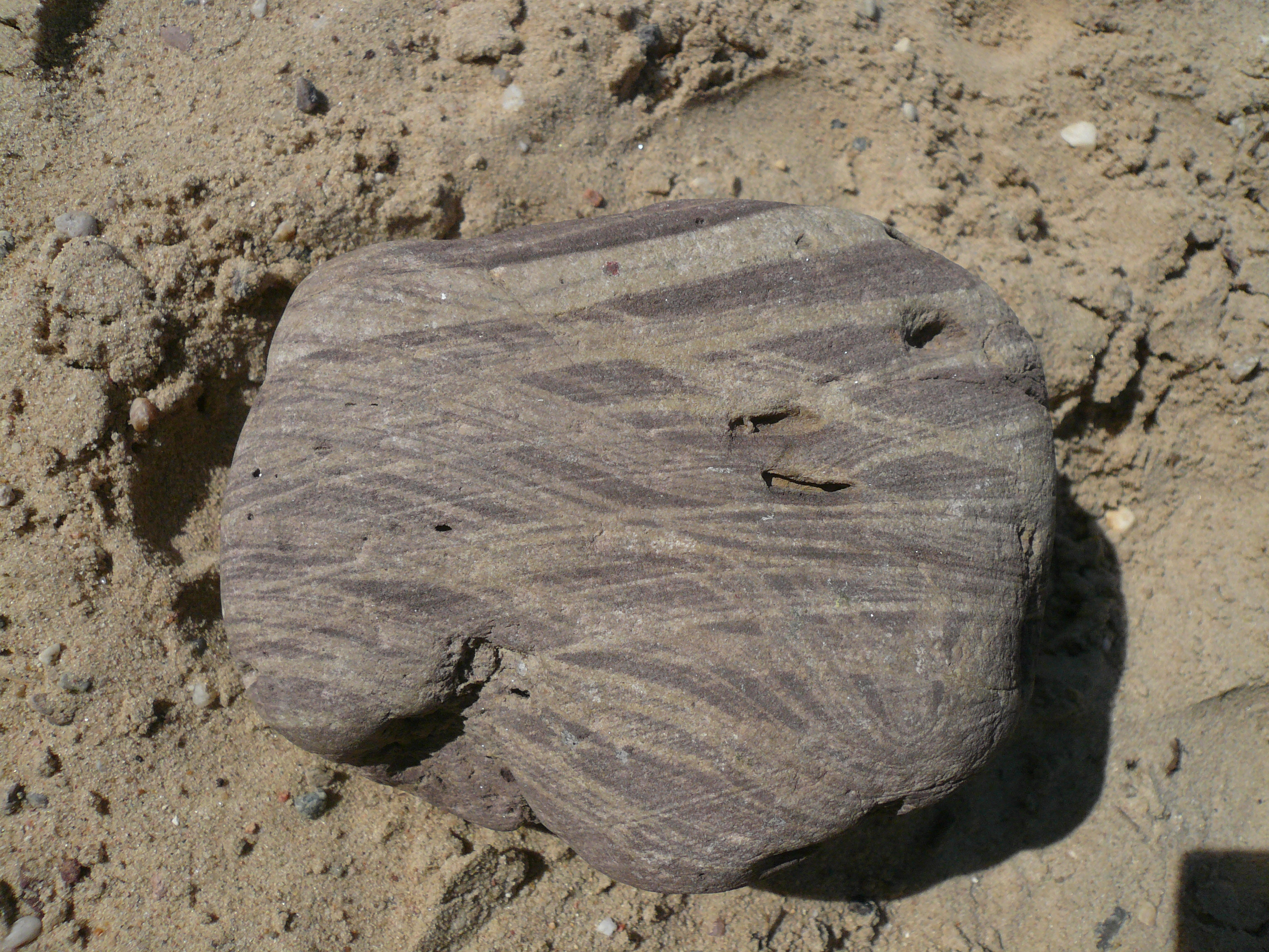 Sandstone from Kalmarsund, Sweden